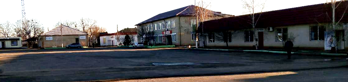 Центральна площа, Затишшя